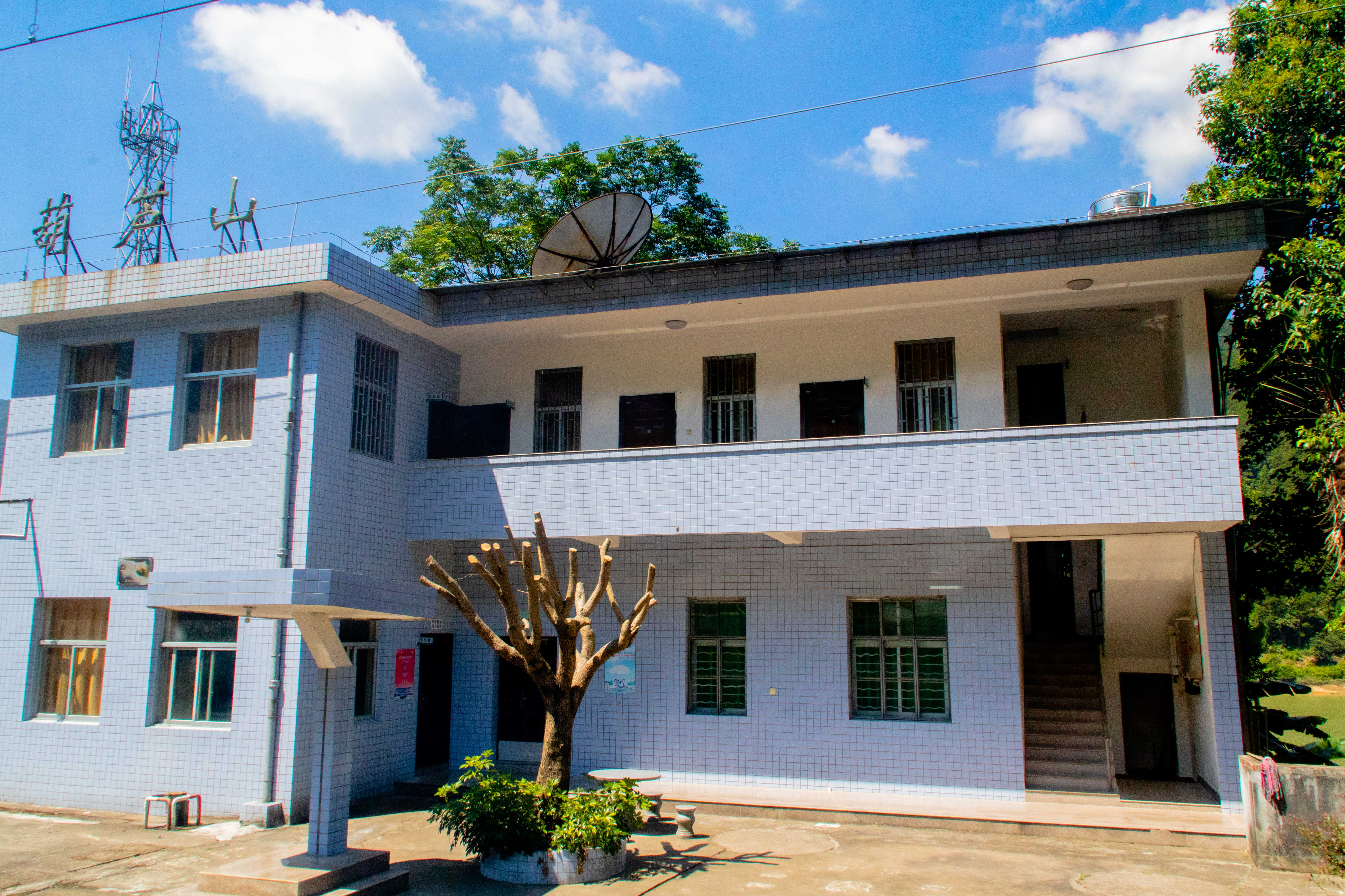 葫芦山站站房